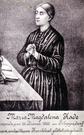 Selige Magdalena Kade aus Philippsdorf, Tschechien